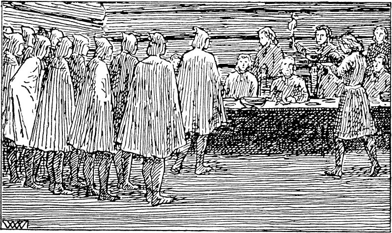 Wilhelm Wetlesen: Illustration for Magnus Erlingssons saga, Heimskringla 1899-edition. nn: «Erling og hans menn gjekk straks inn for høgsetet.»